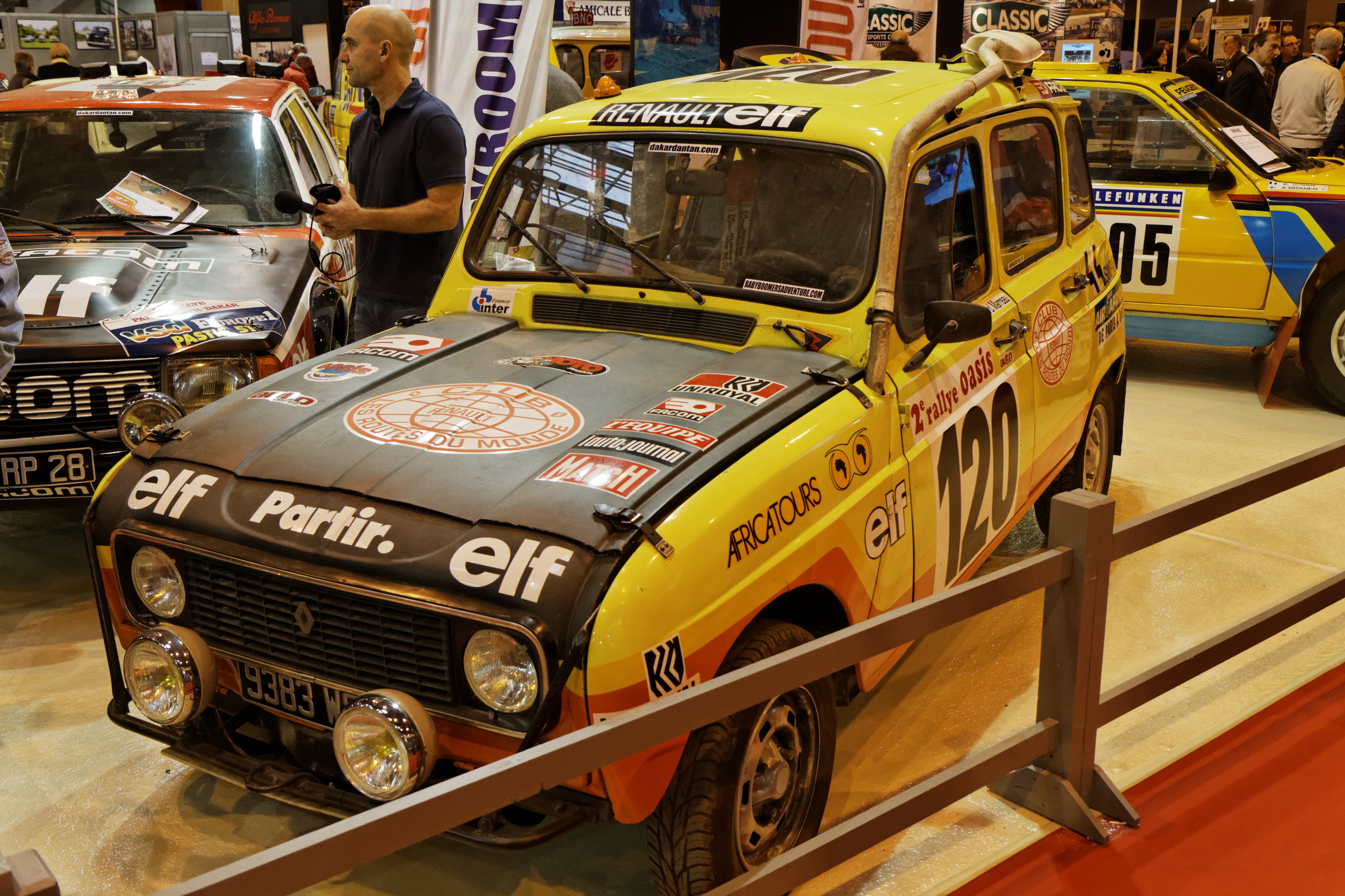 La Renault 4 des frères Marreau présentée lors du salon Retromobile 2014.